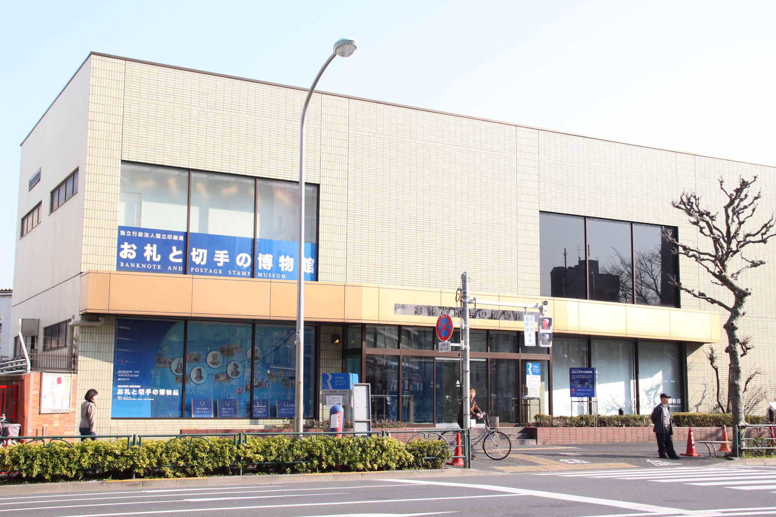 お札と切手の博物館（外観）